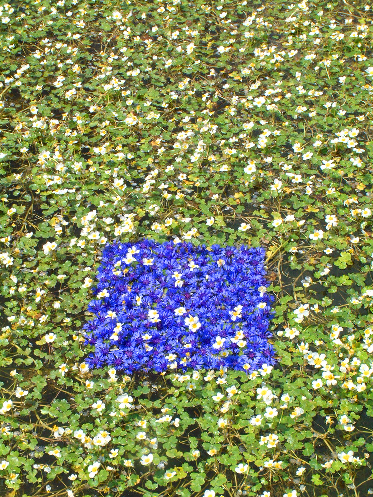 Naturinstallation Kornblumenquadrat, 2003